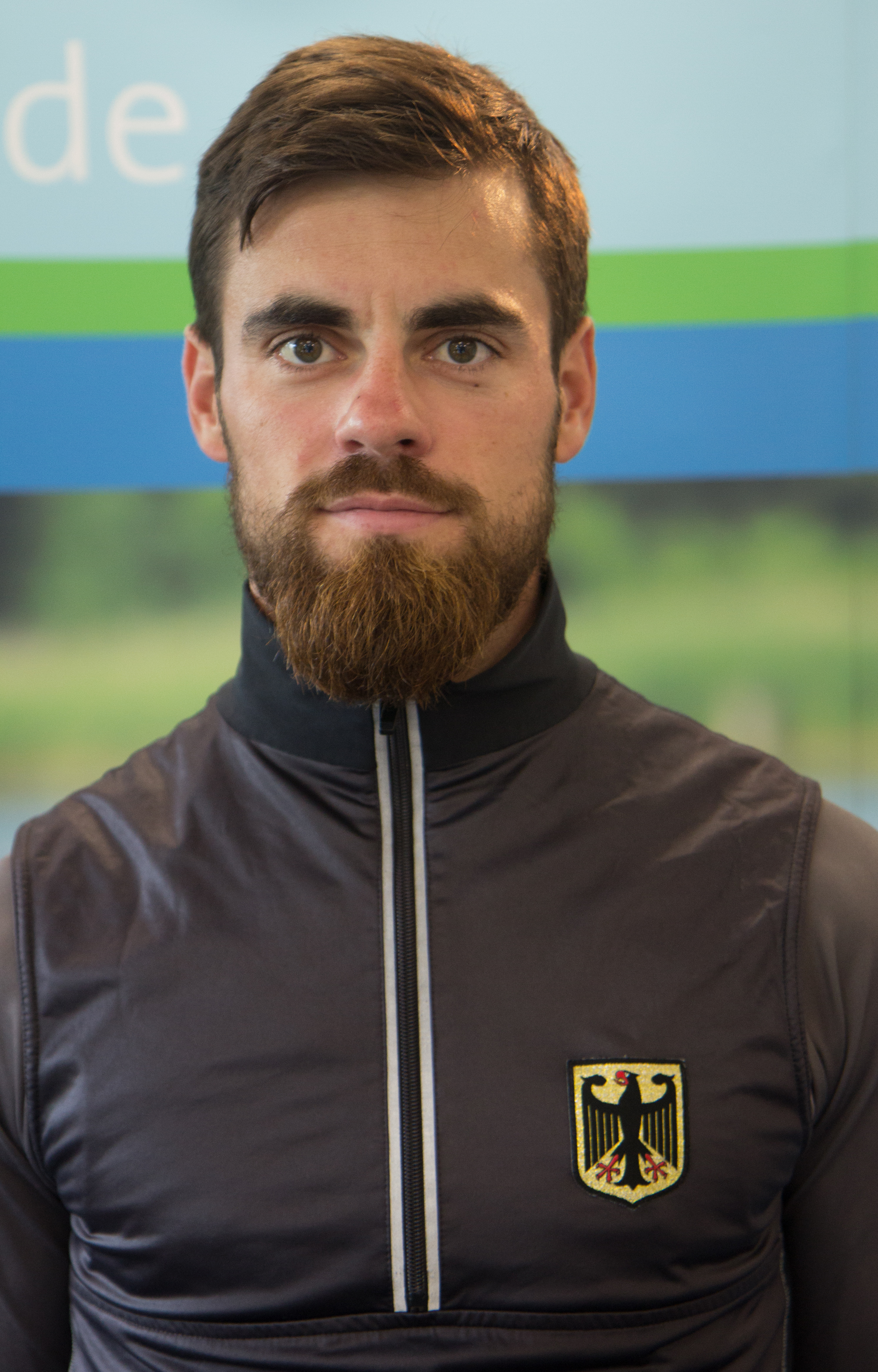 Lars Wichert beim Medientag des Deutschen Ruderverbandes am 6. September 2017 in der Ruderakademie in Ratzeburg.